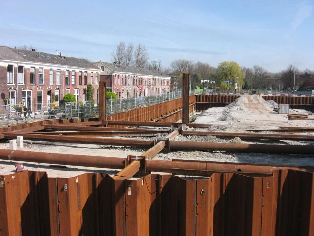 koepoortgarage bouwput